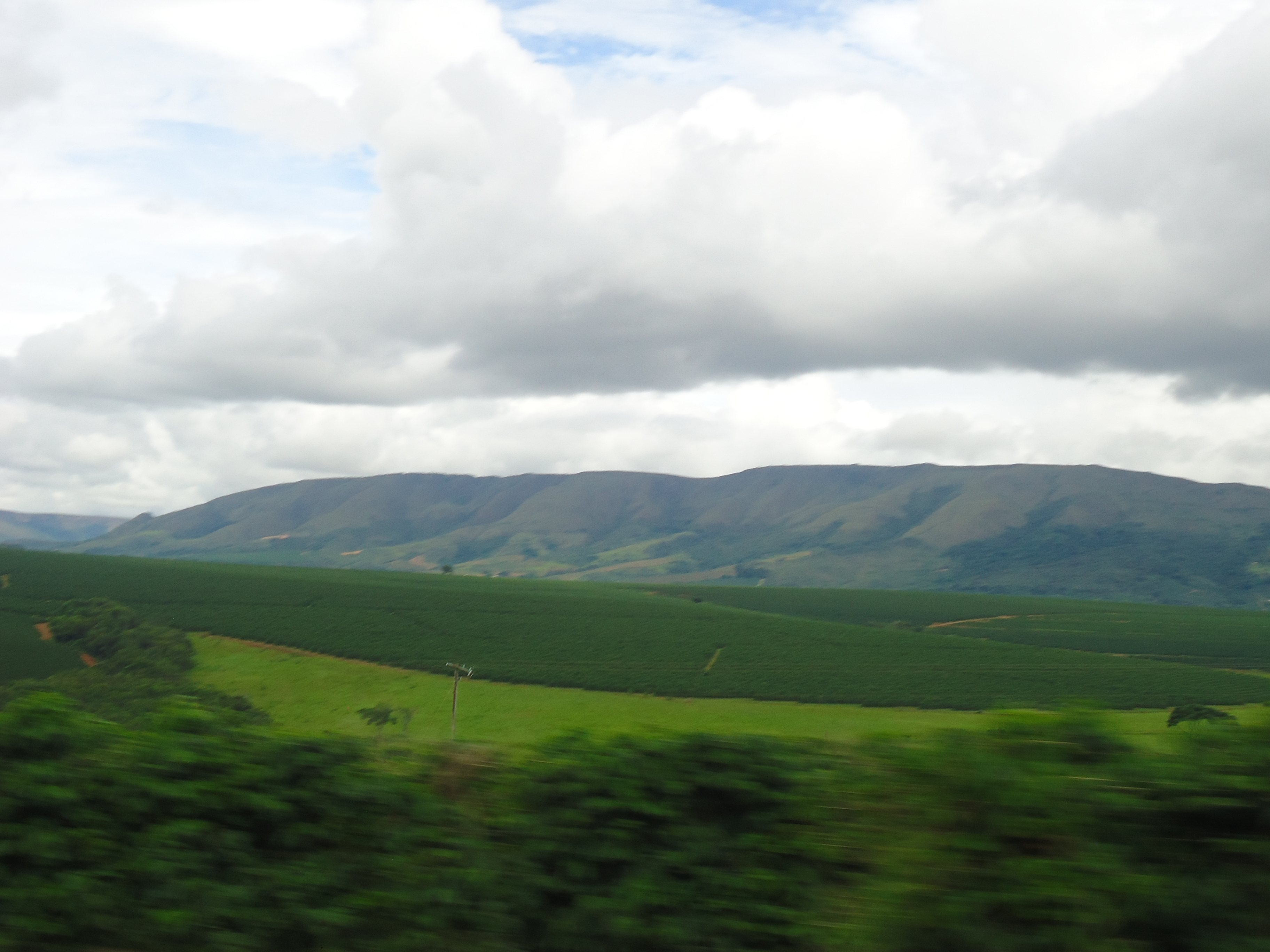 Vista da parte sul da Serra da Boa Esperança